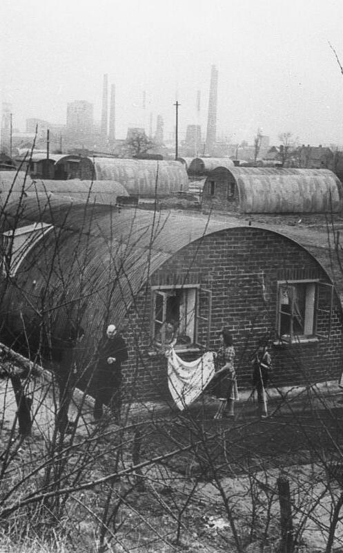 Illus/ADN Nissenhütten für Bergarbeiter Im Berliner Westgebiet zahlreichen Presseangriffen ausgesetzt, wird sie jetzt den Ruhrkumpels als ideale Behausung proklamiert. 1947